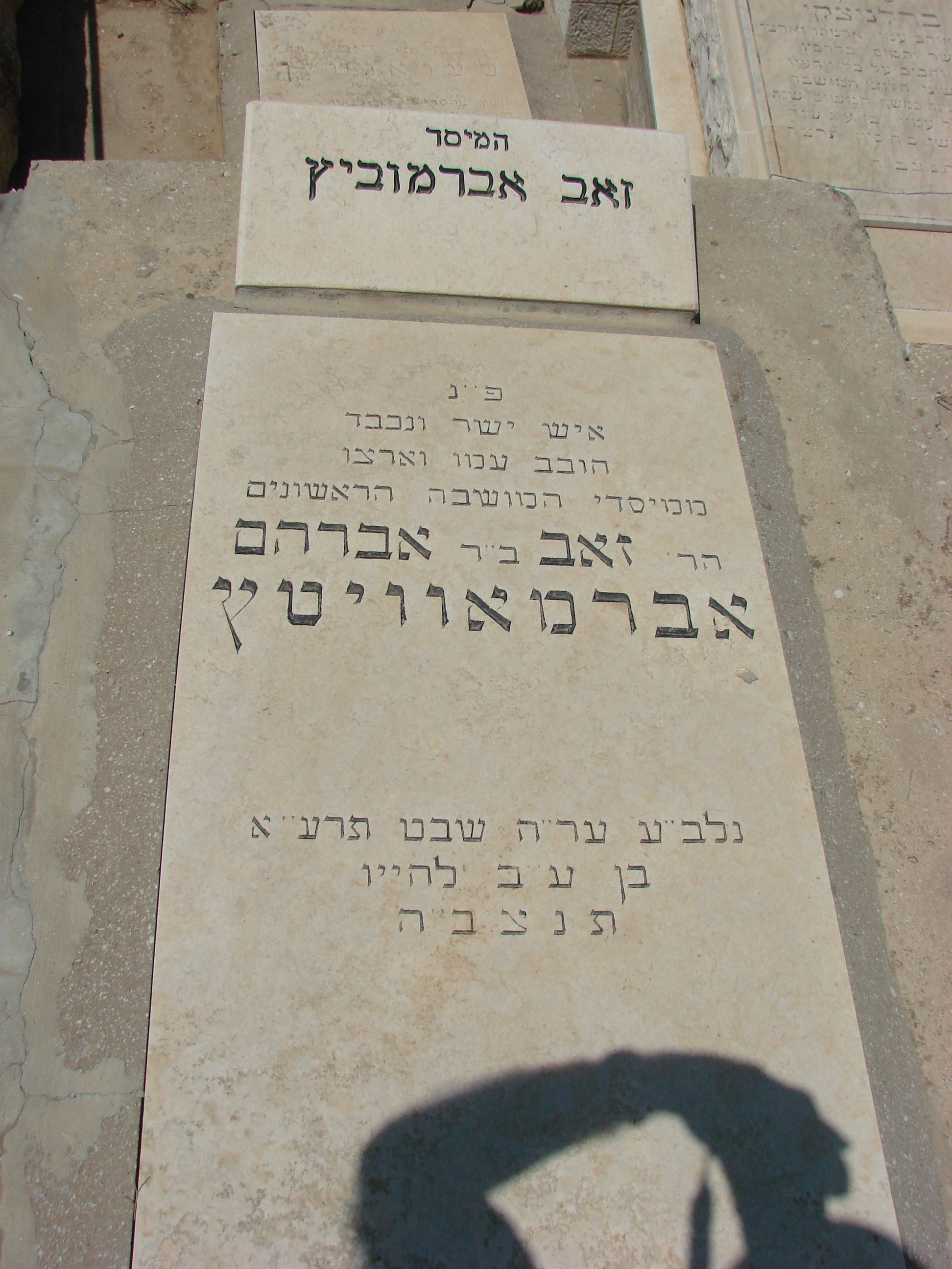 קברו של זאב אברמוביץ בבית הקברות הישן בראשון לציון